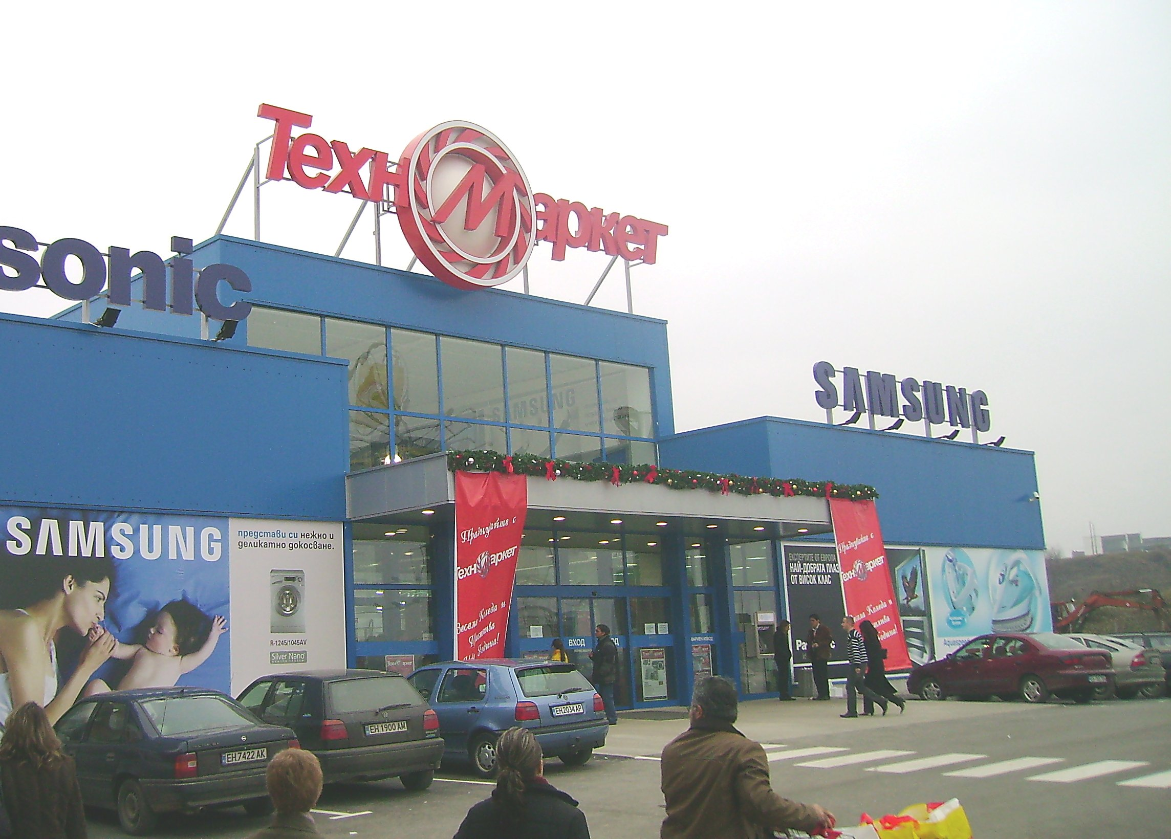 Technomarket in Pleven